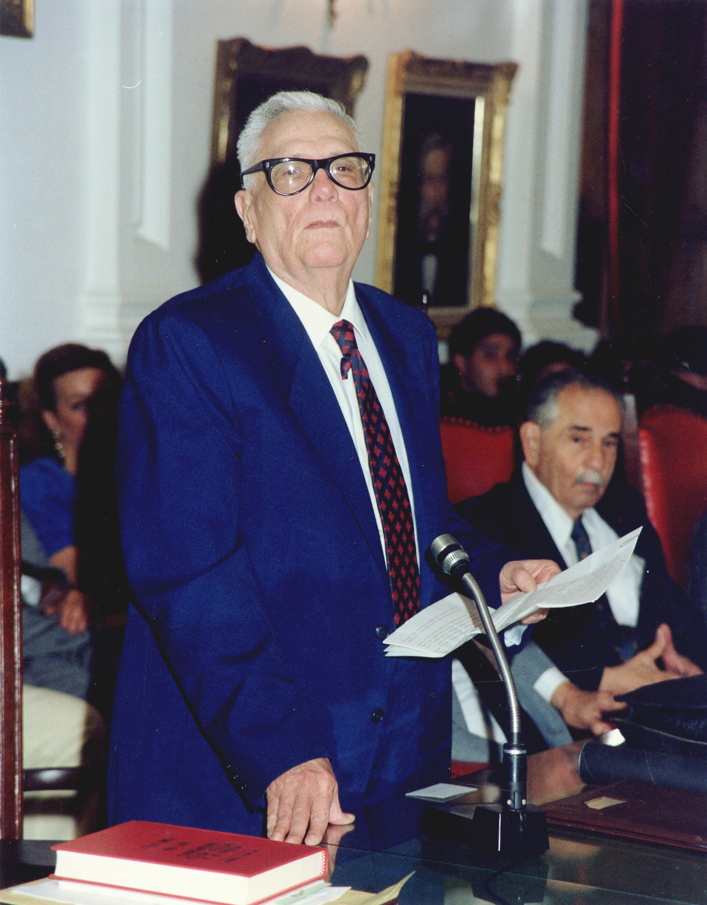 Recibiendo el Premio Nacional de Historia